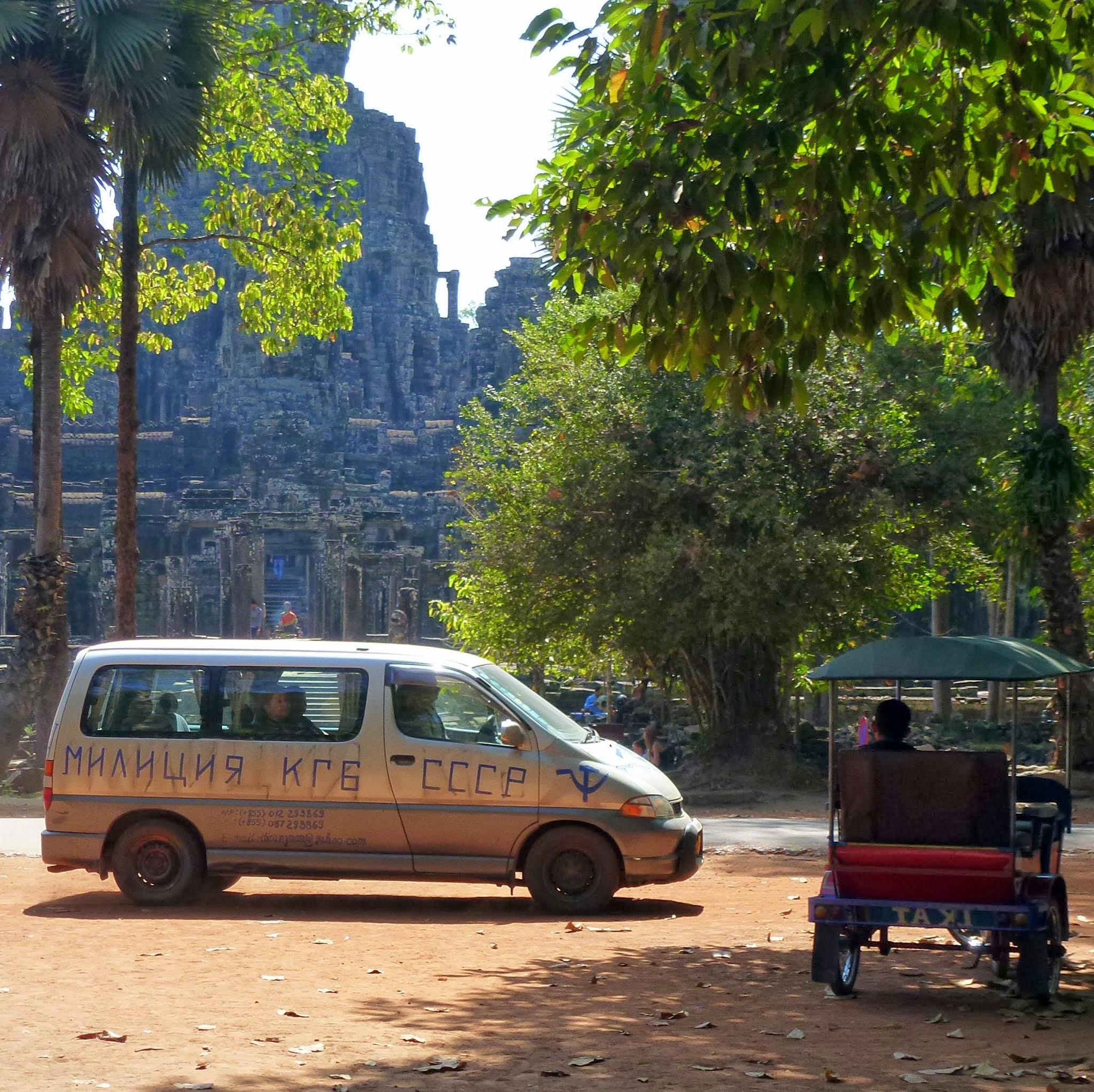 Angkor Thom, Siem Reap, Cambodia